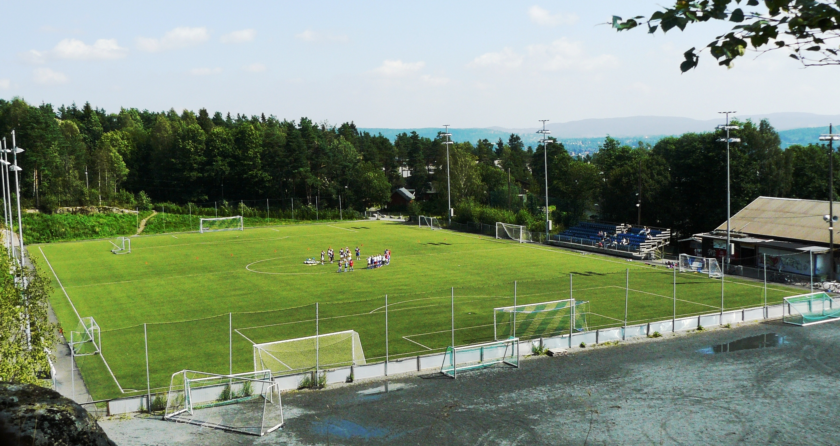 Greibanen - turf stadion, Oslo